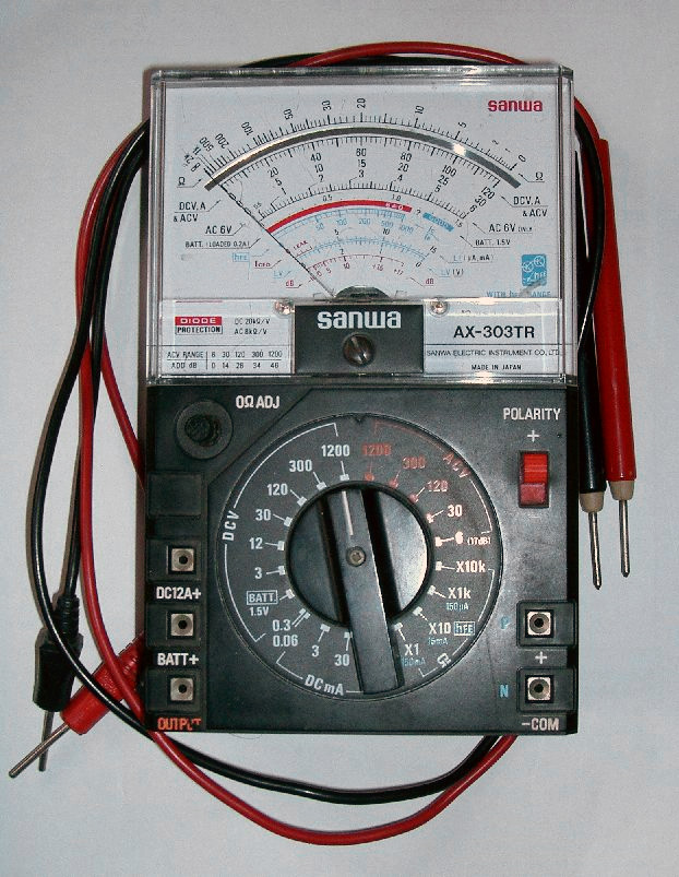 Analog Multimeter